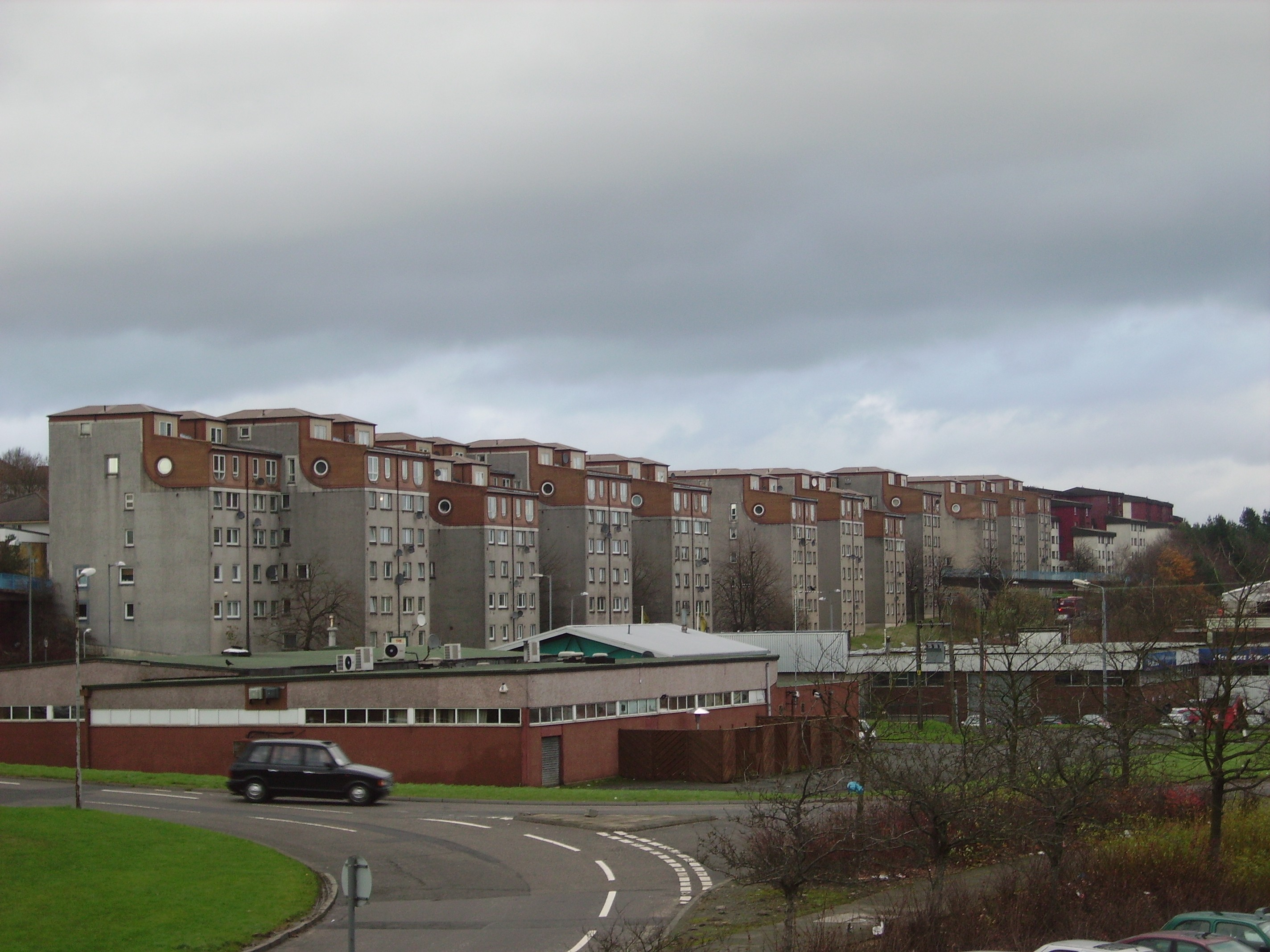 my pic